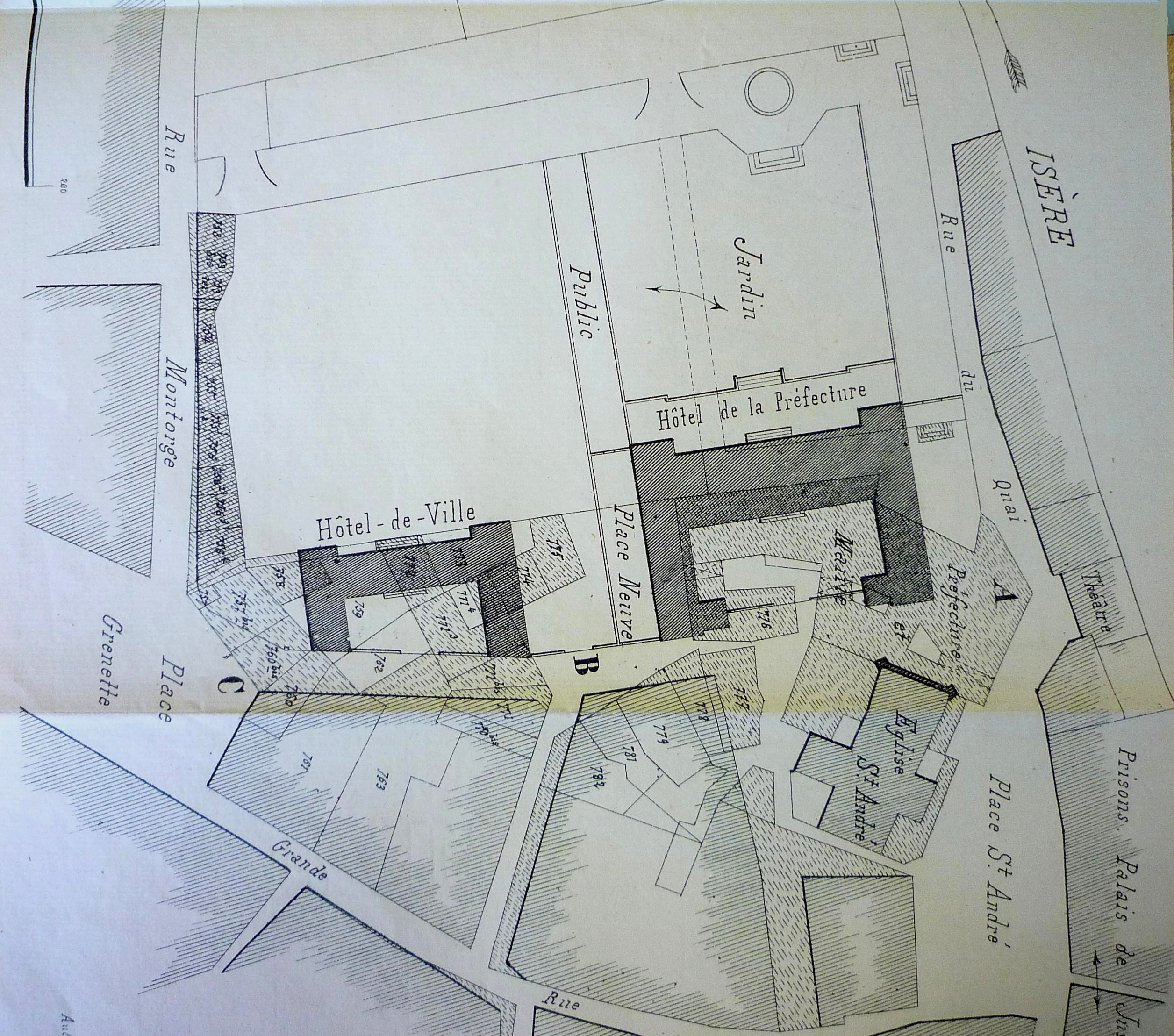 Projet nouvelle mairie et nouvelle préfecture à Grenoble en mai 1857. Le projet ne sera pas retenu. Archives départementales de l'Isère, cote 4N2/2